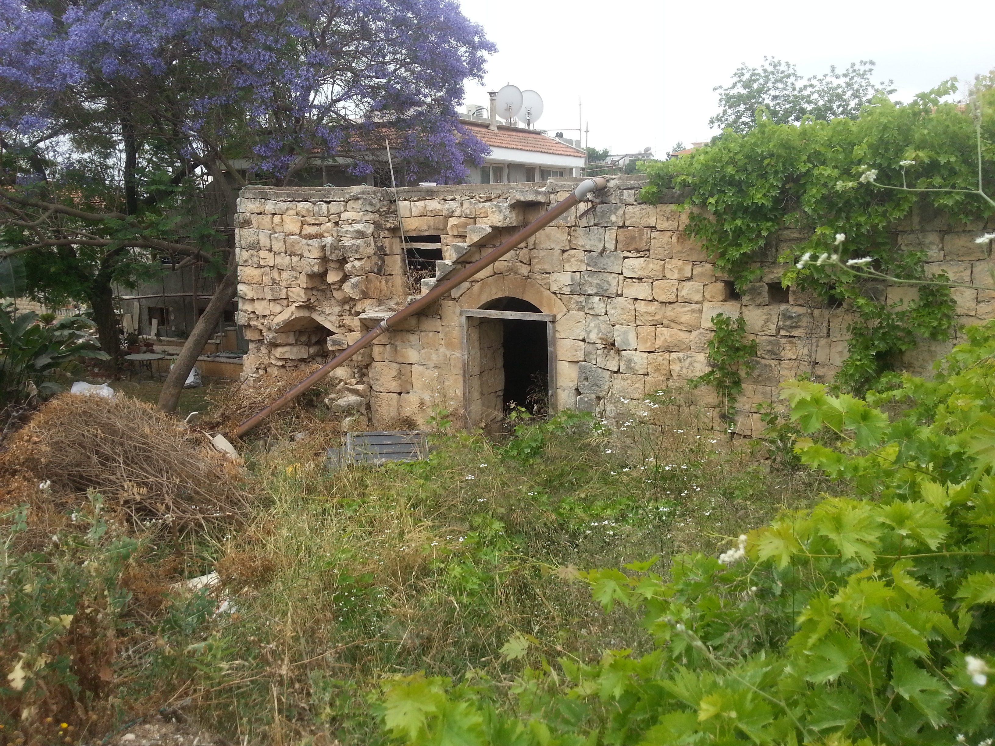 בית בד עתיק